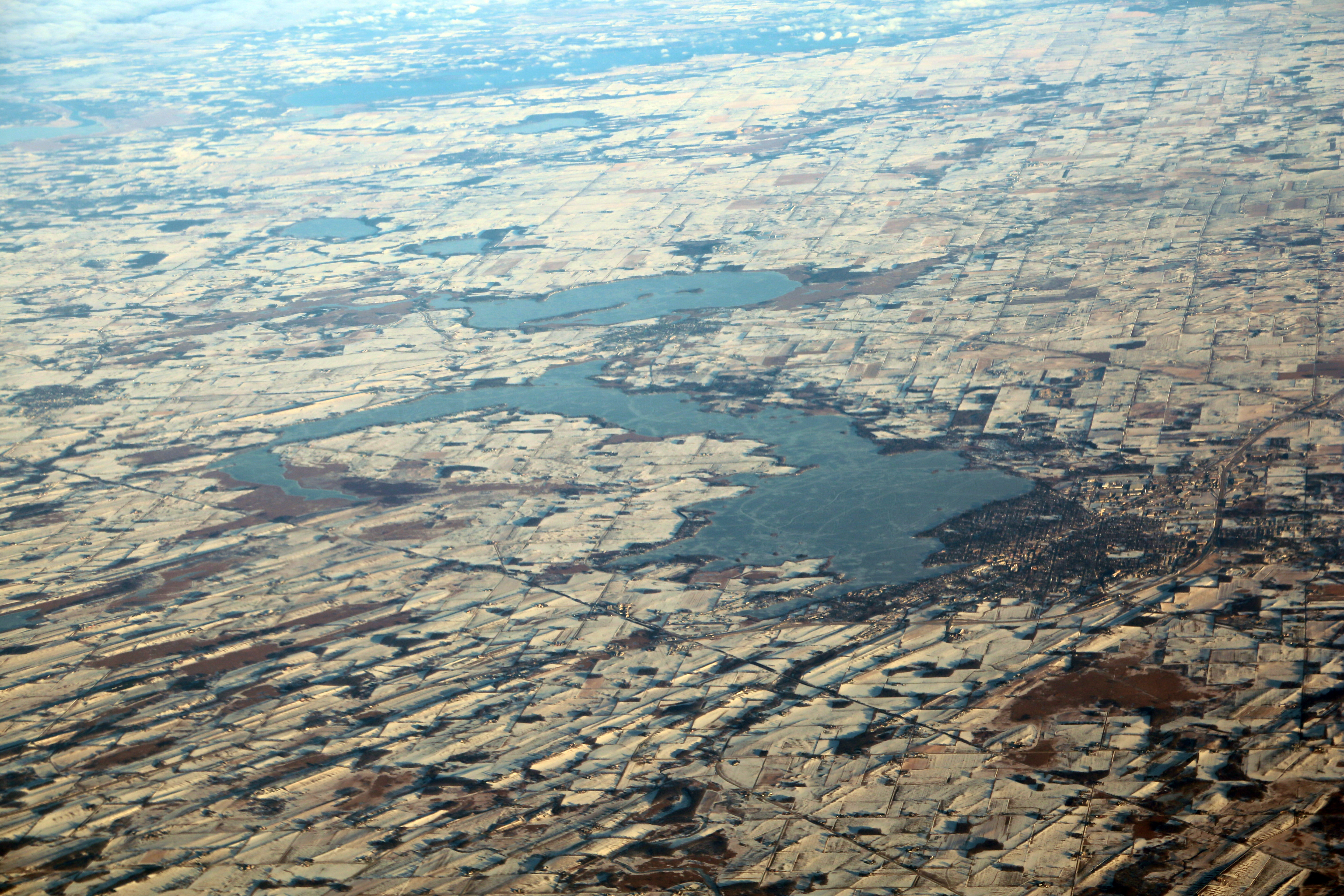 Beaver Dam Lake, Wisconsin